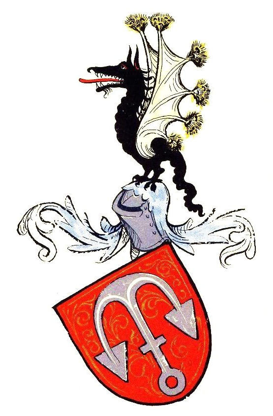 Wappen der von Pettau (des Perristan von Pettaw in Steyr). (Grafik vereinzelt und die Richtung der Heraldik gemäß)